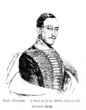 Récsey Ádám Magyarország miniszterelnöke. 1848. október 3-án V. Ferdinánd király törvénysértő eljárással, a magyar minisztérium ellenjegyzése nélkül magyar miniszterelnökké nevezte ki.